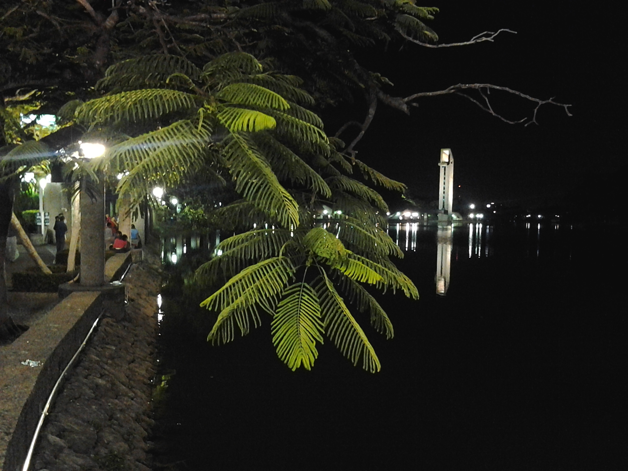 Vista del mirador, desde la laguna.